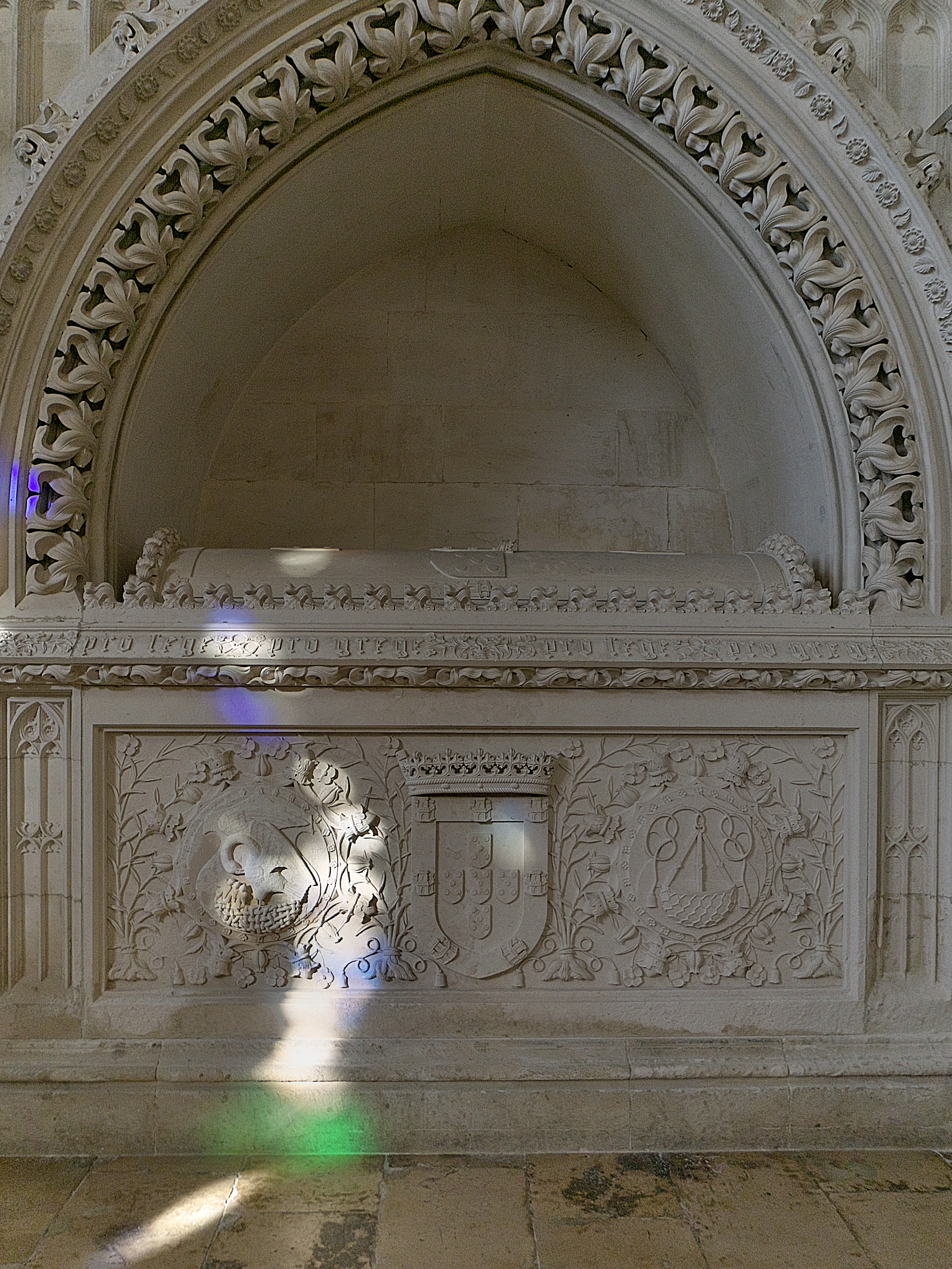 Capilla del Fundador, Monasterio de Batalha. Sepulcro de Juan II de Avís